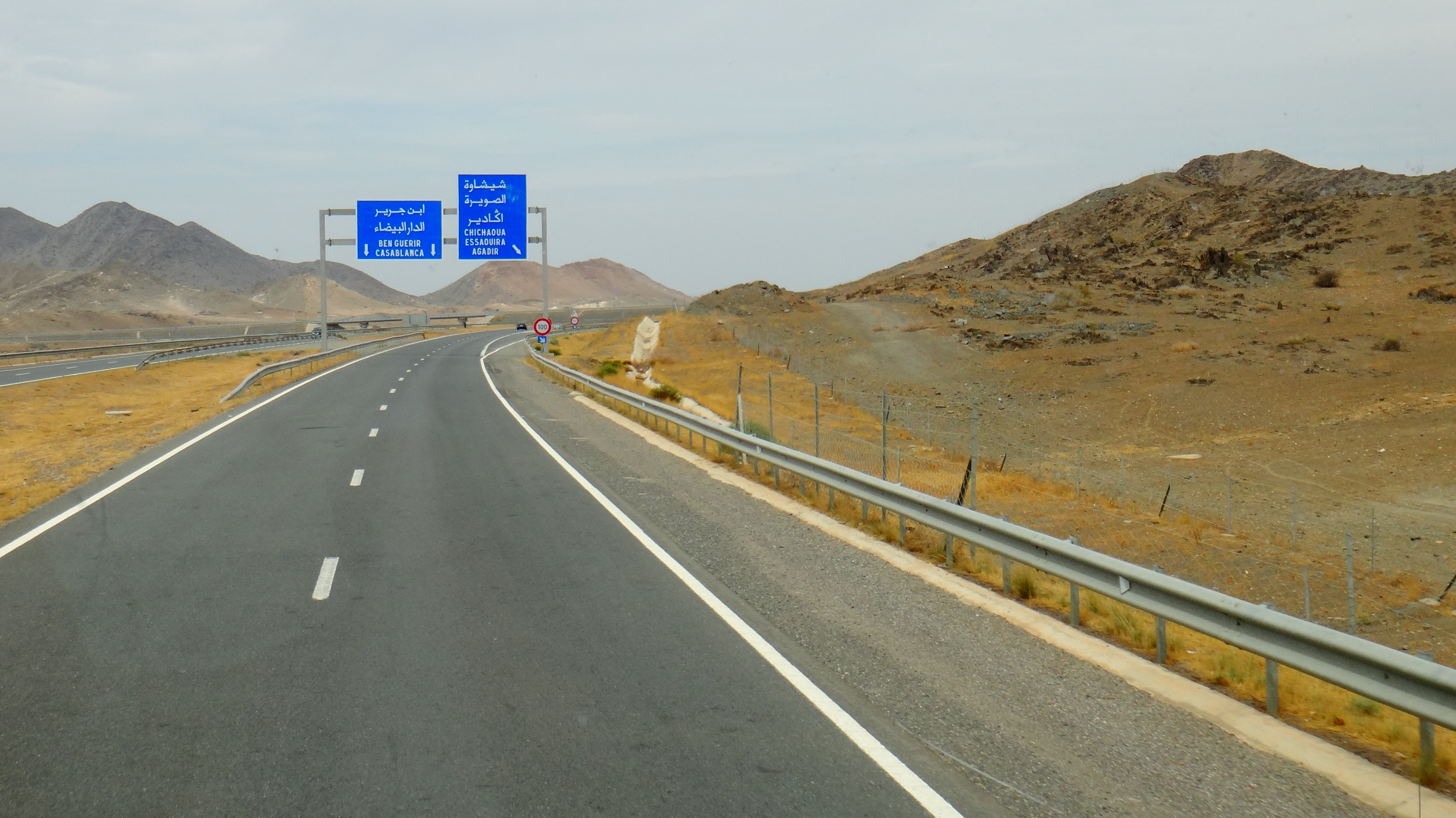 Rehamna, Morocco